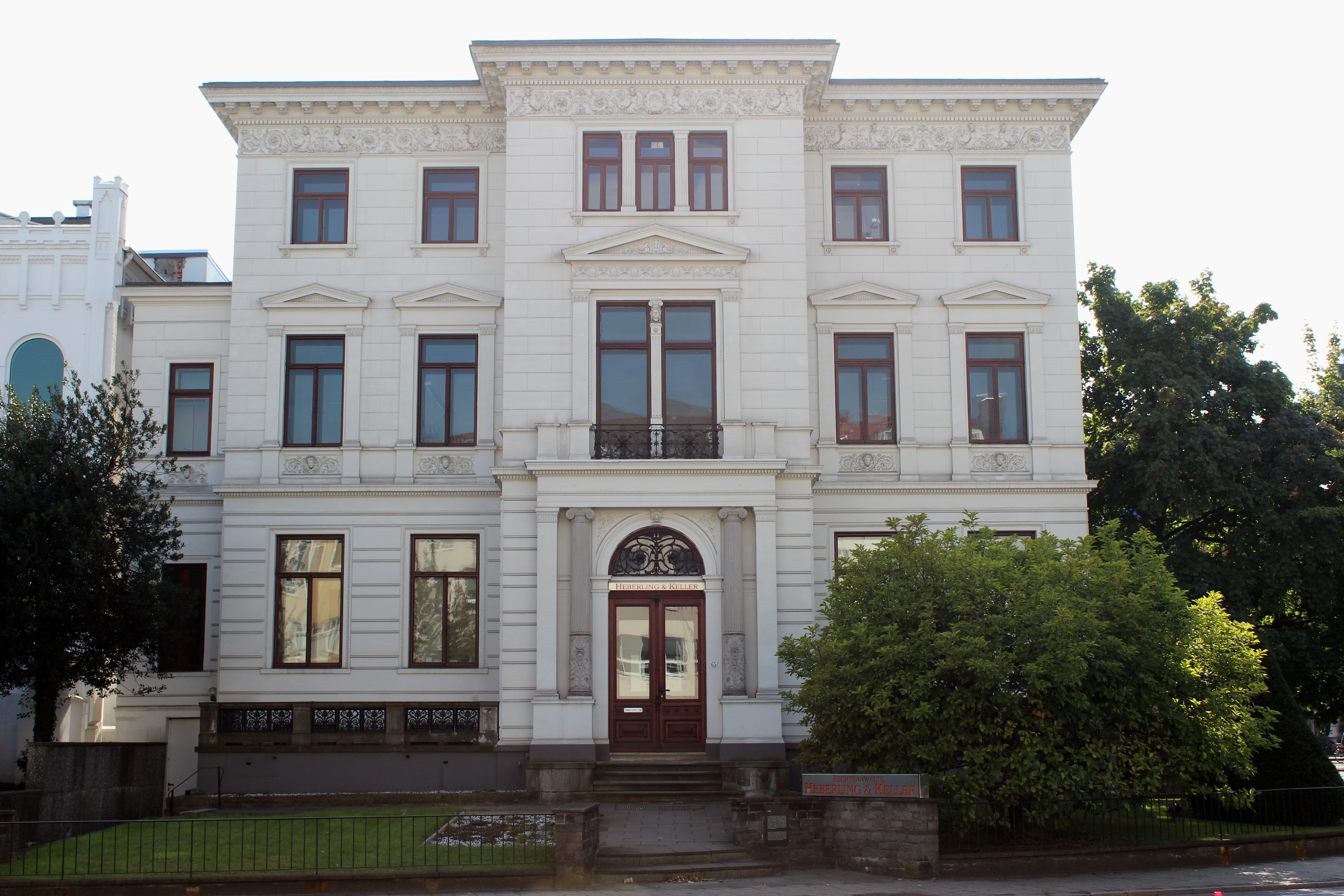 Wohnhaus in Bremen, Außer der Schleifmühle 65Das abgebildete Objekt ist ein geschütztes Kulturdenkmal in der Freien Hansestadt Bremen, mit der Nr. 0099 beim Landesamt für Denkmalpflege registriert.